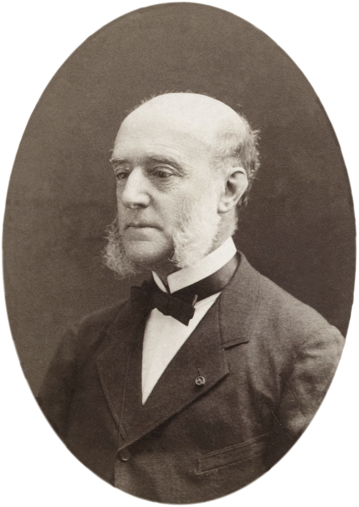 Louis de Mas Latrie (1815-1897), historien, paléographe et diplomatiste français.